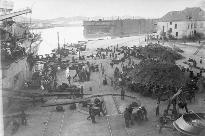 China, Tsingtau, Werft, Kohlenverladung China, Tsingtau Kohlenübernahme an der Werft